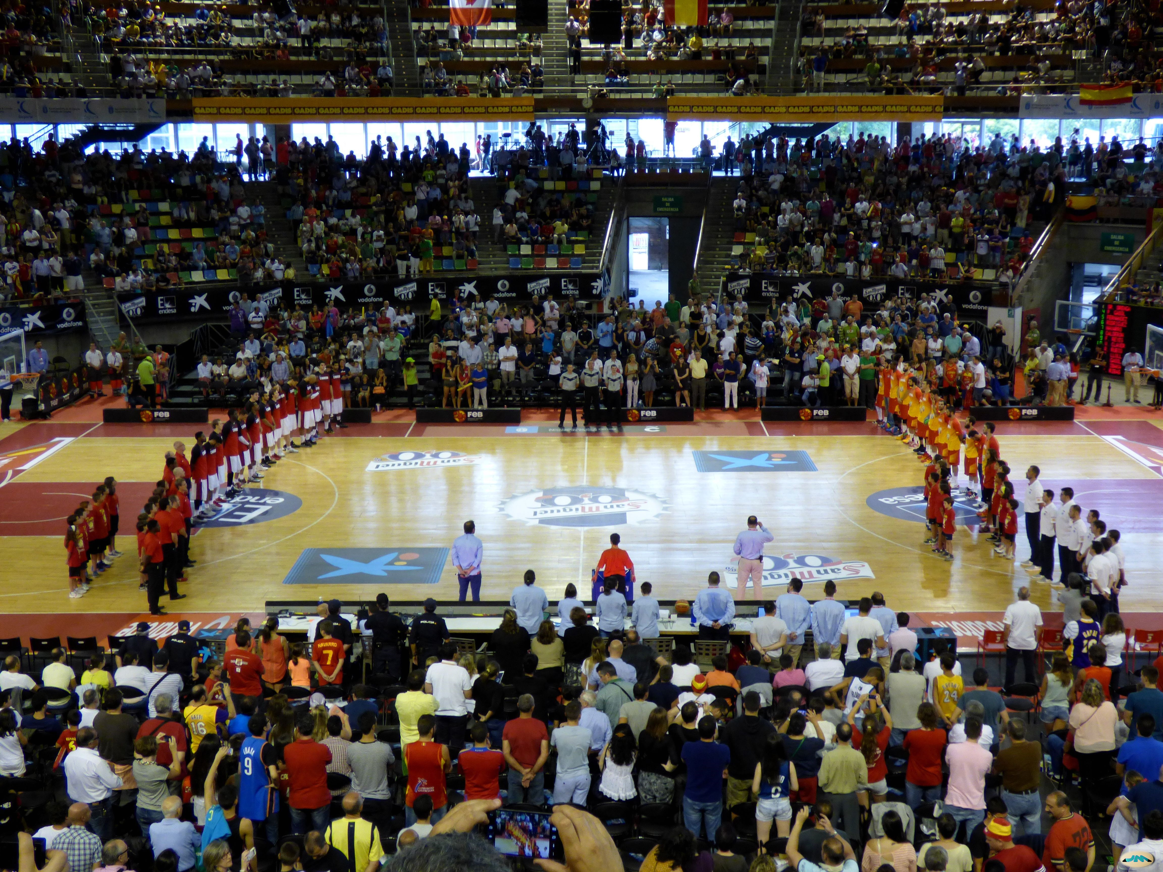 Partido España - Canadá de Baloncesto